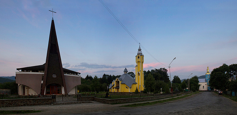 Церкви села Довге